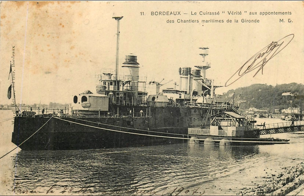 Lancement de la cuirassé Vérité en 1907